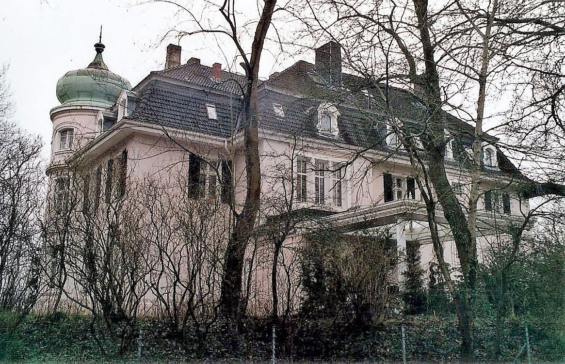 einstiges Wohn- und Geschäftsvilla von Moritz Neumark, Besitzer des Lübecker Hochofenwerks.